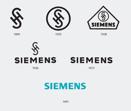 Siemens Logos